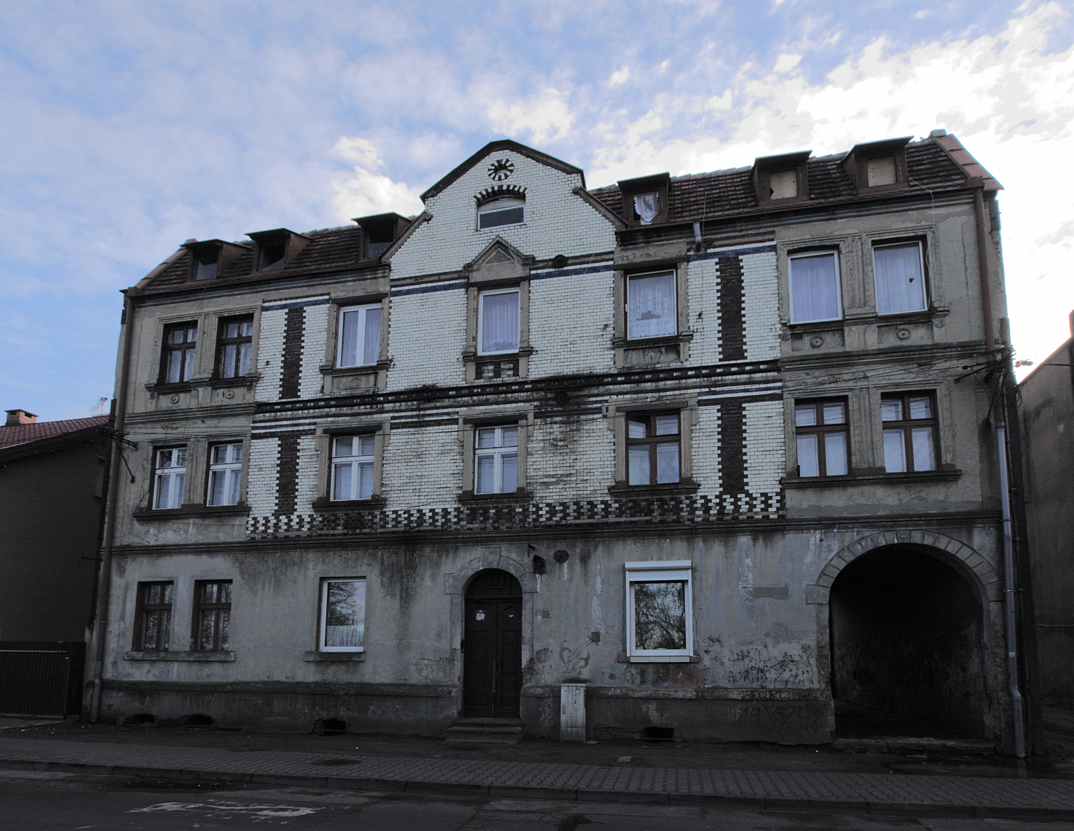 Zabrze. Ulica Staromiejska. Budynek nr 55a.